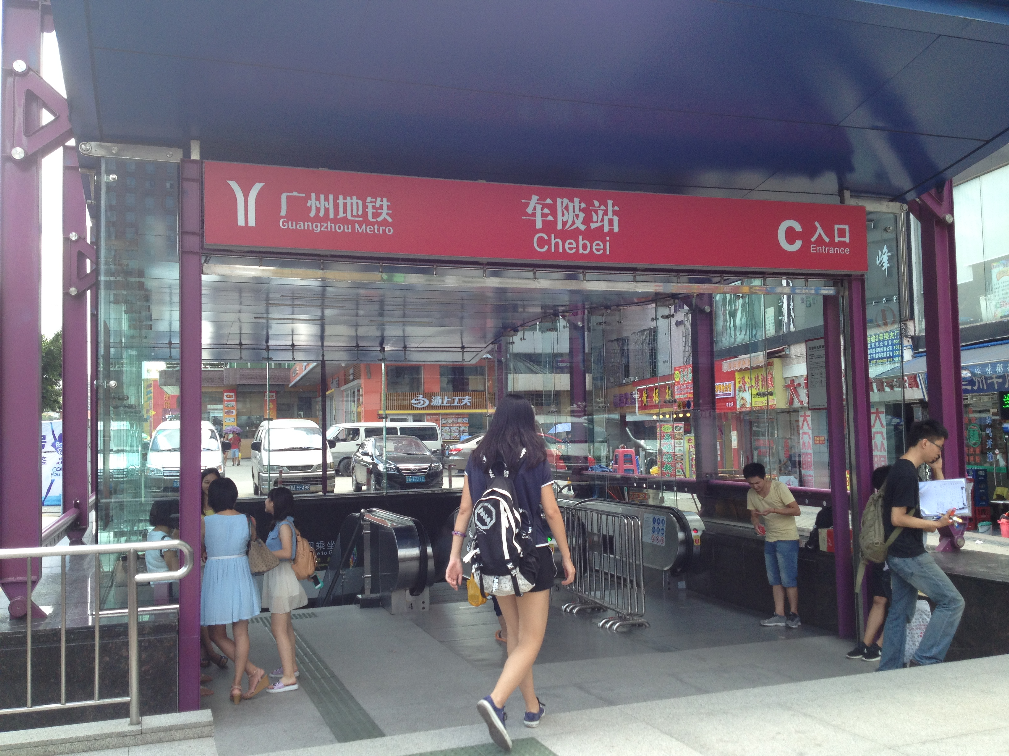 广州地铁车陂站C出口